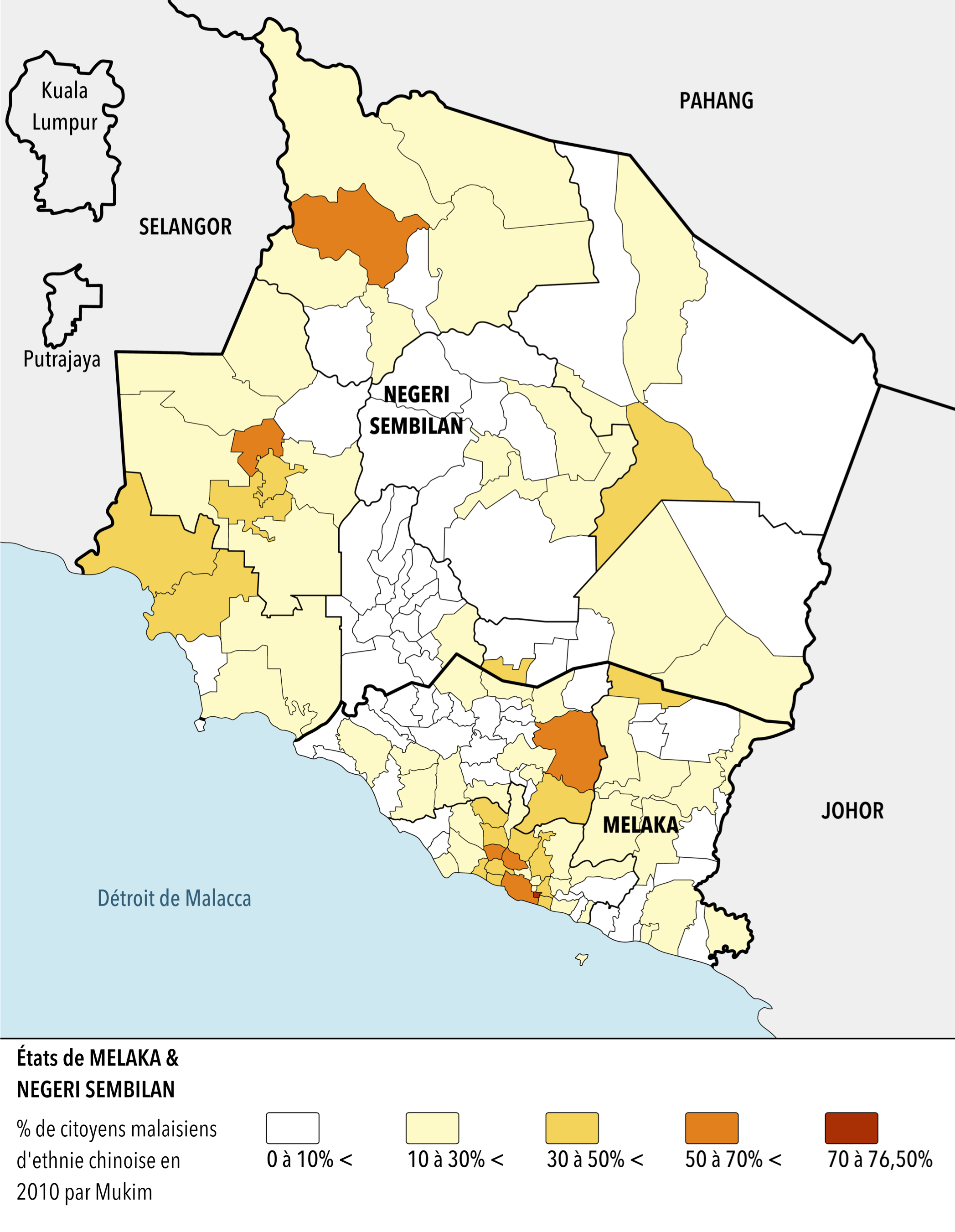 Répartition des citoyens malaisiens d'ethnie chinoise par Mukim en 2010.